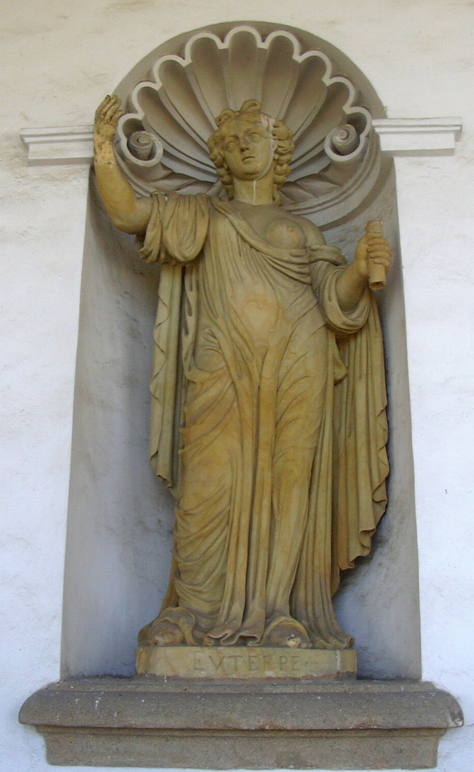 Euterpé - socha Kroměříž Květná zahrada